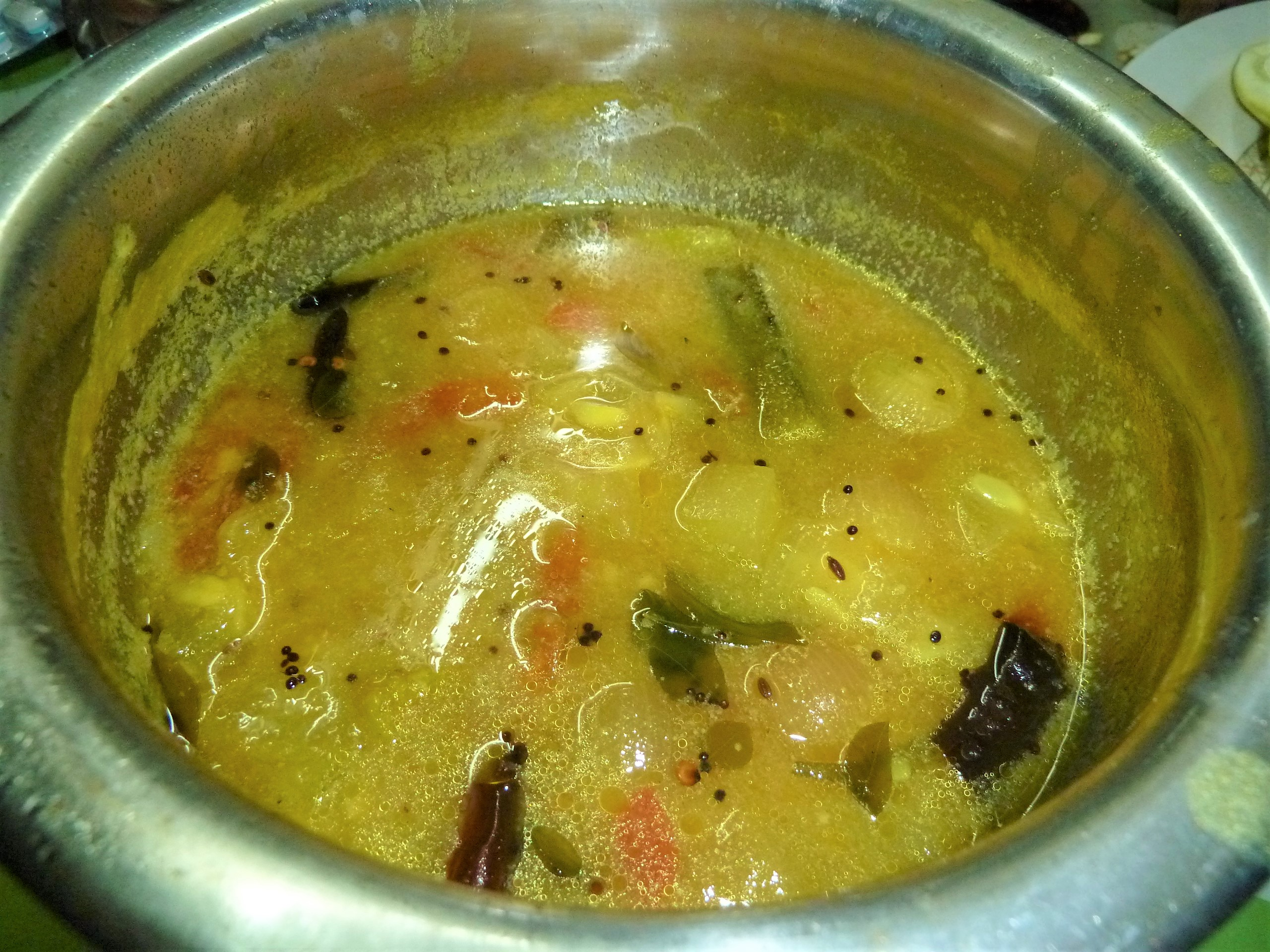 పెసరపప్పు పులుసు